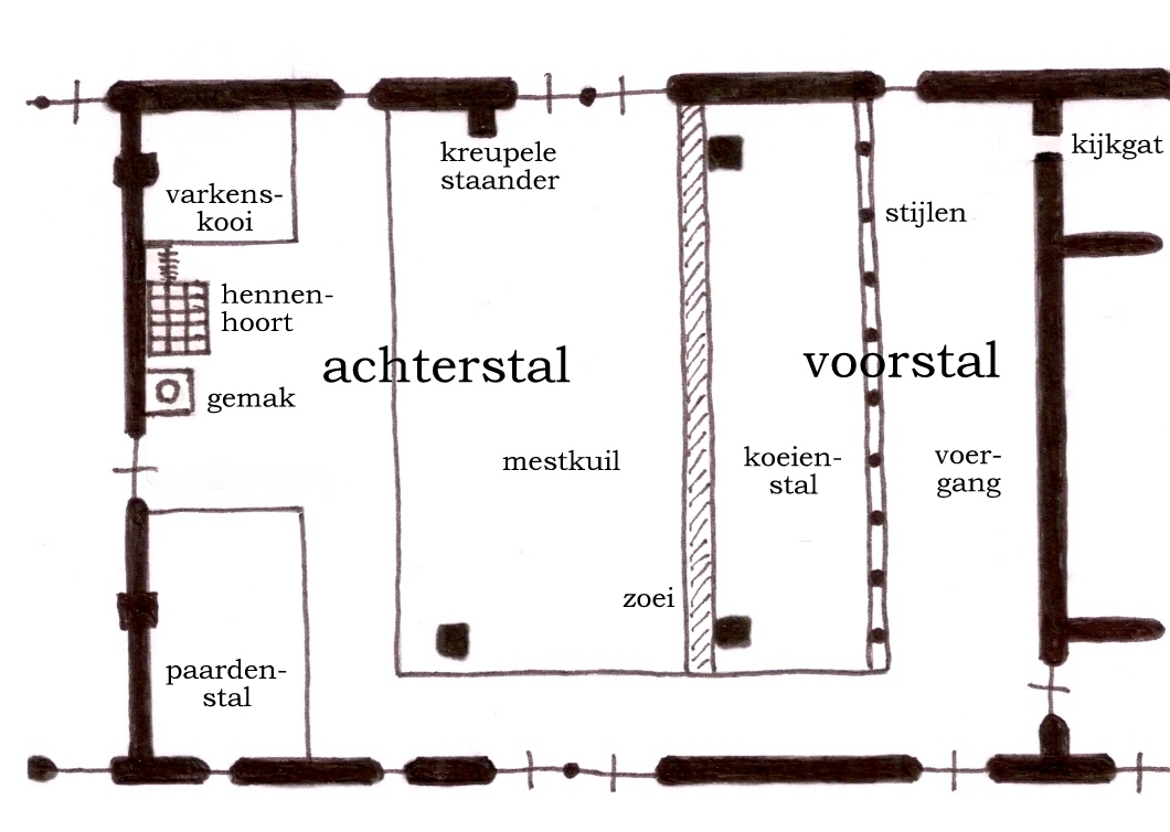 plattegrond van de potstal anno 1750 van de Plashoeve